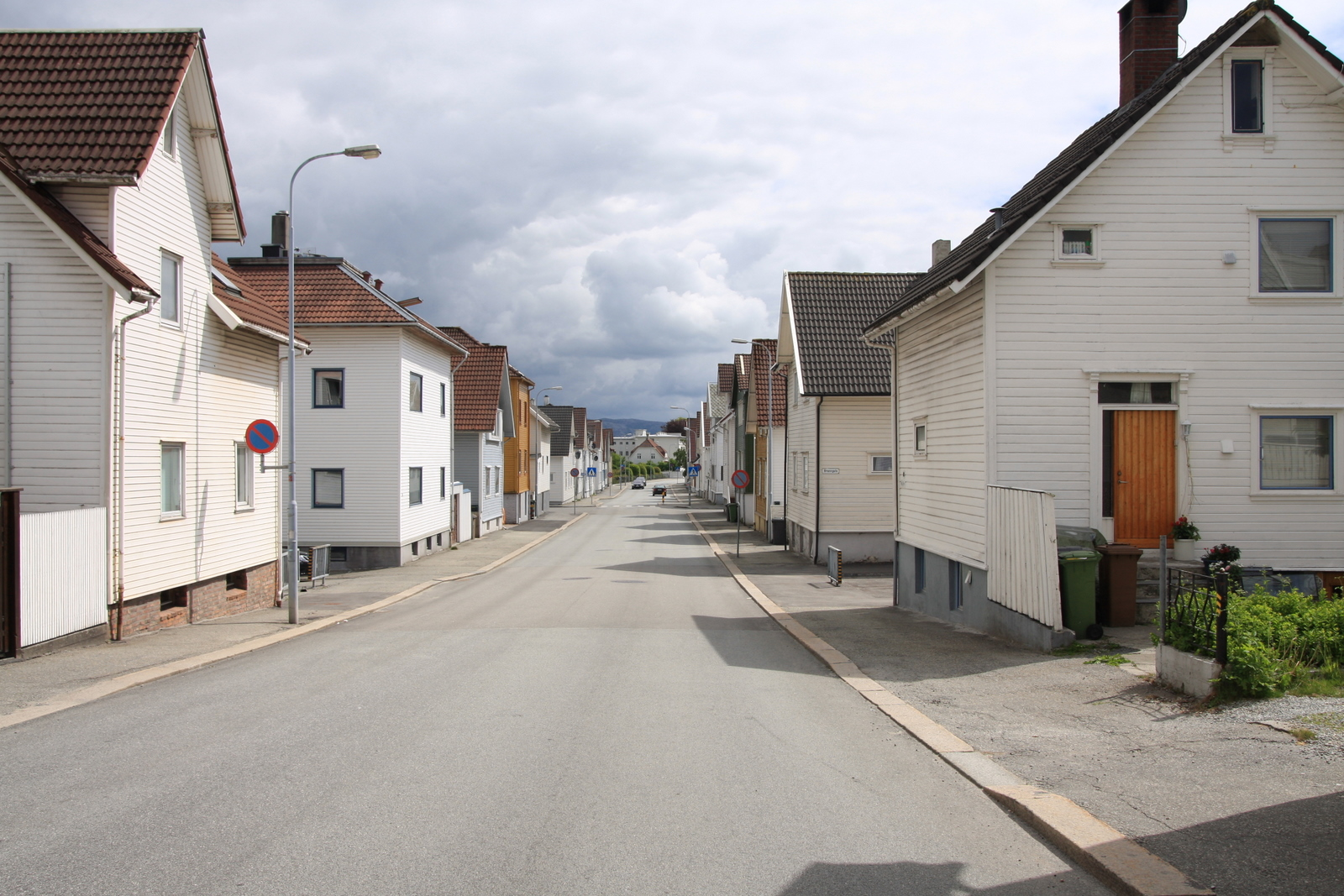 Fylkesvei 420 Wesselsgate